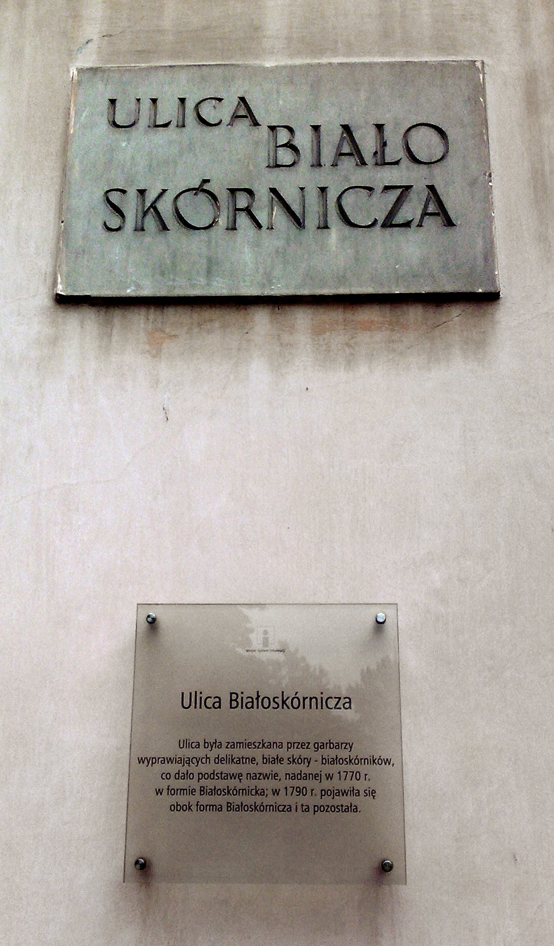 Tablice powięcone najstarszemu rodowi warszawskich białoskórników na domu przy ul. Białoskórniczej w Warszawie